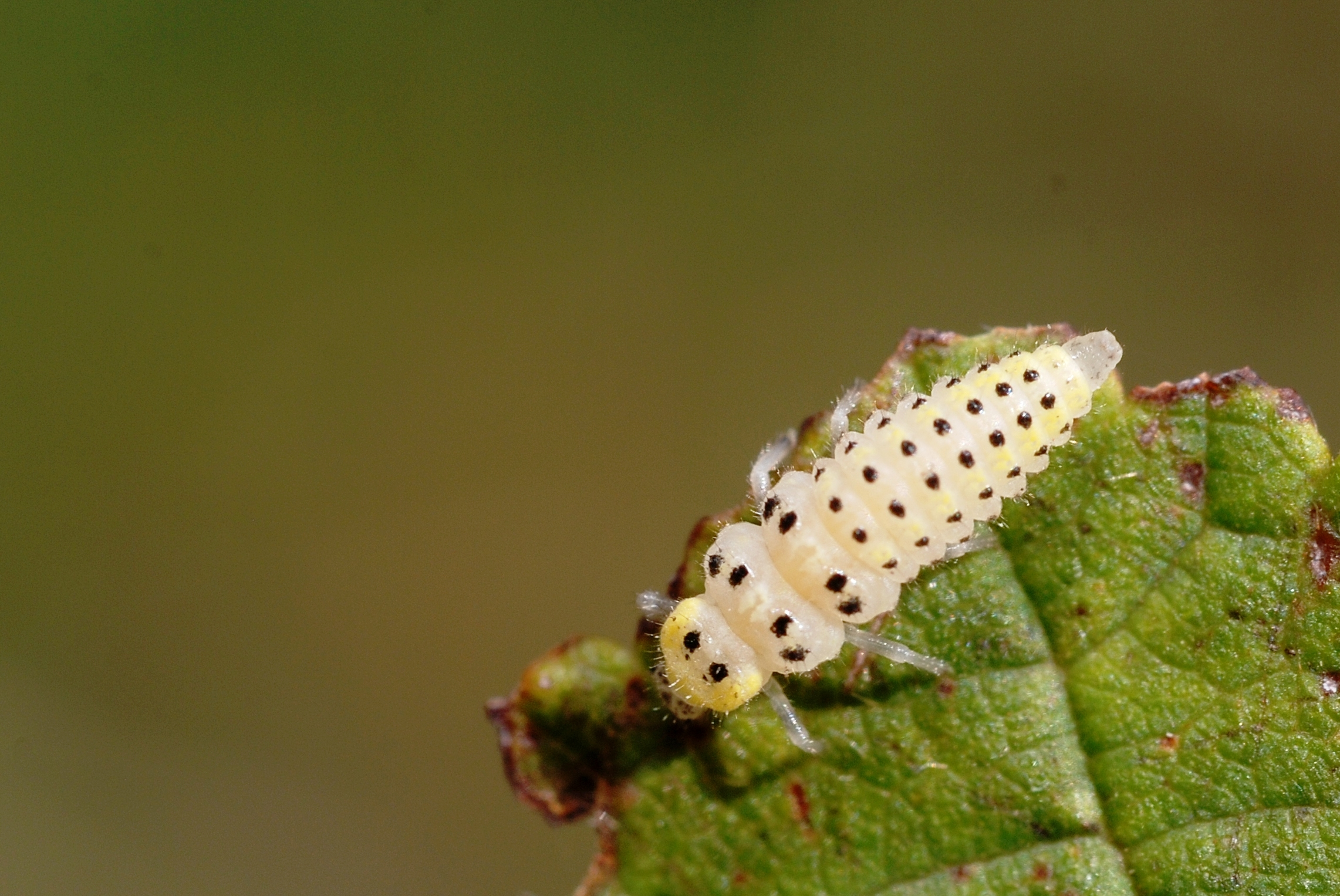 Vibidia duodecimguttata larva